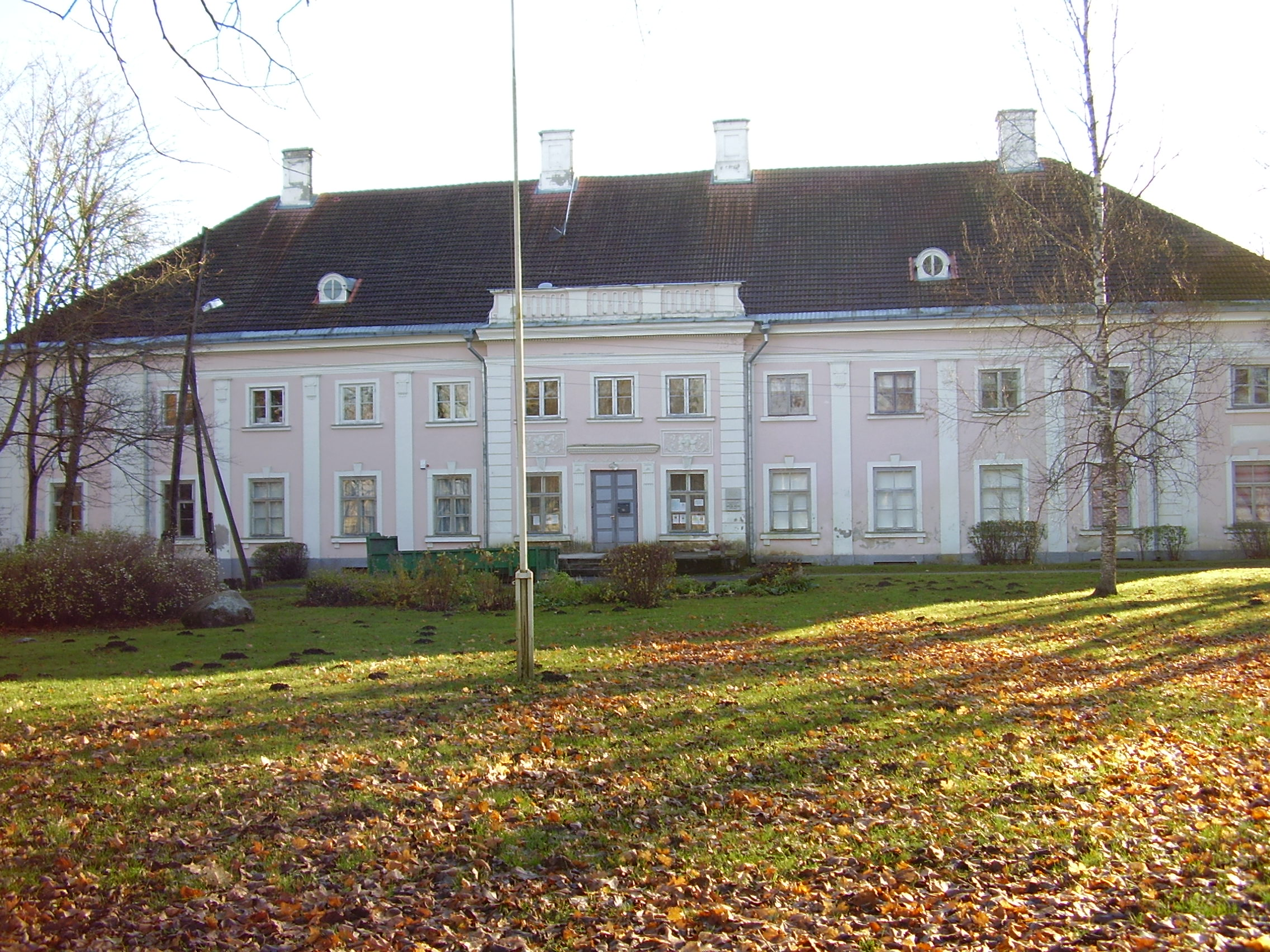 Anija mõisa peahoone